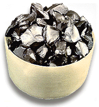 Silizium Ingot-Material für die Wafer-Herstellung